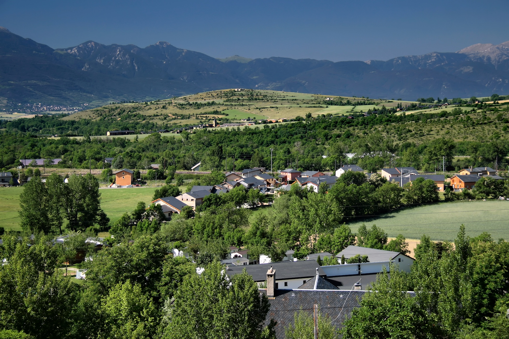 Enveitg